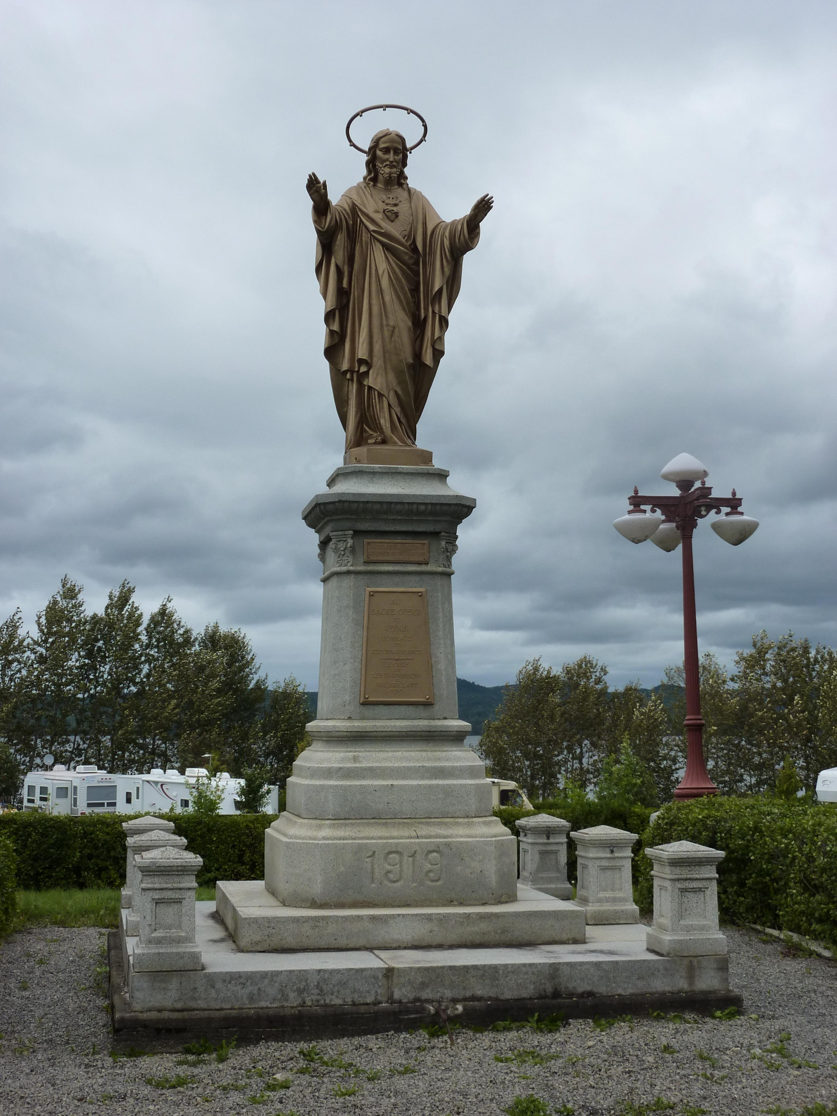 Statue du Sacré-Coeur de Jésus faisant face à l'église de Val-Brillant